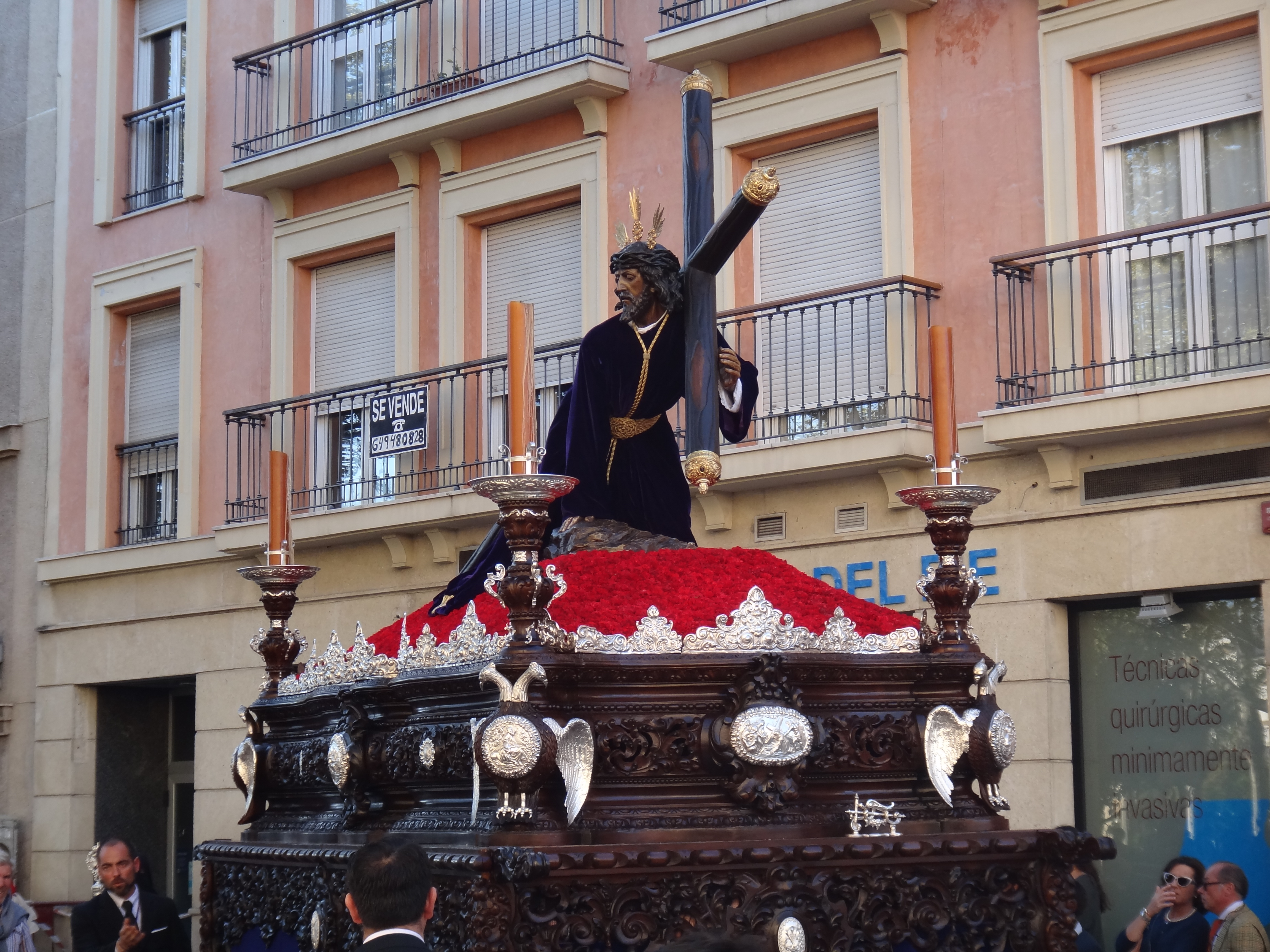 Las Tres Caídas. Semana Santa de Jerez de la Frontera 2015 (Andalucía, España)